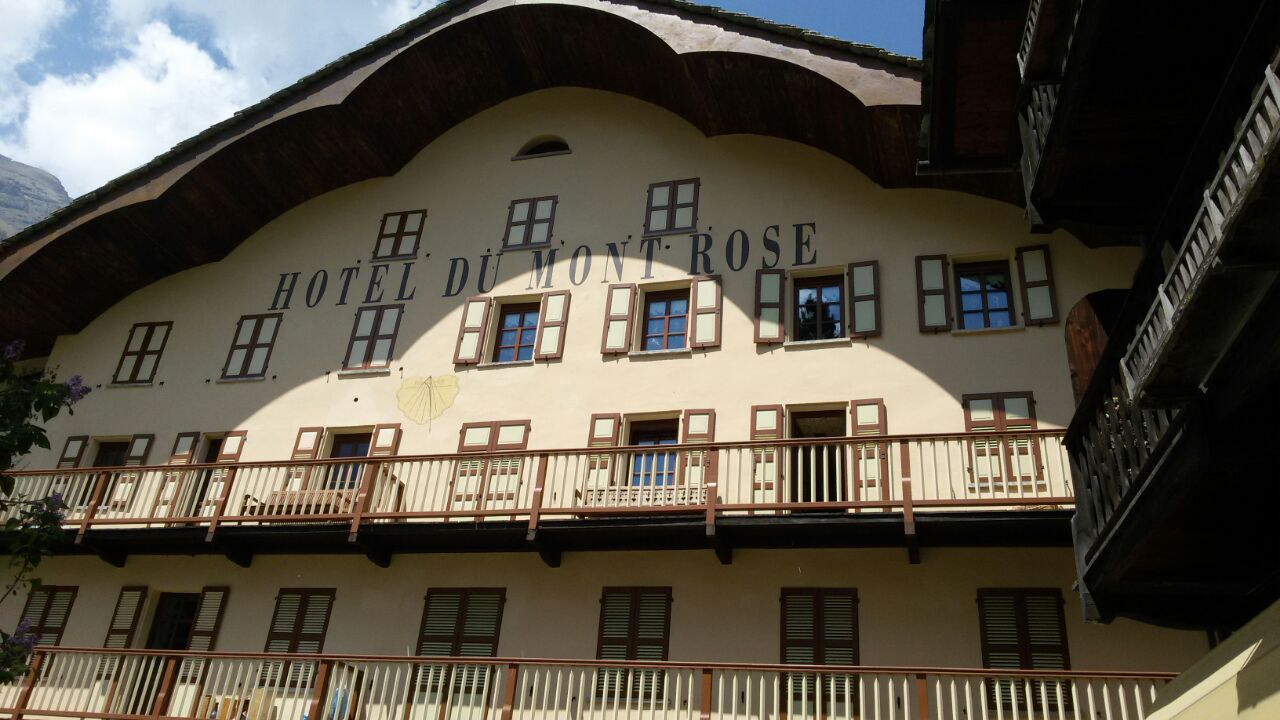 Gressoney-Saint-Jean - Hôtel du Mont Rose - Vallée d'Aoste